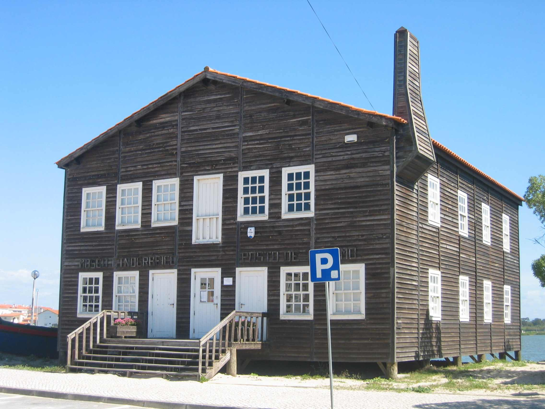 Praia de Mira - Museu Etnográfico - Portugal